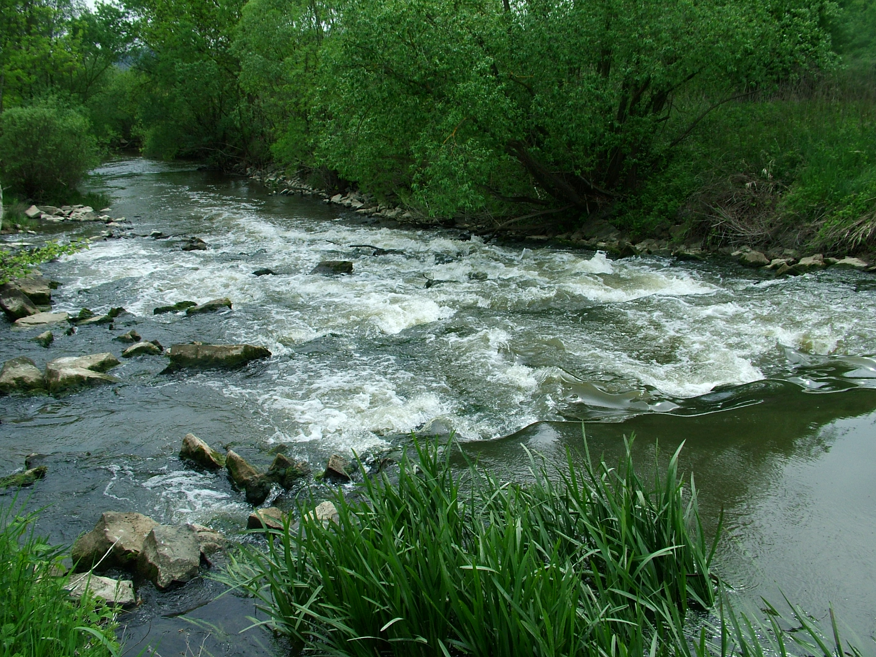 A Zala Zalaszentgrót központja közelében található zúgója